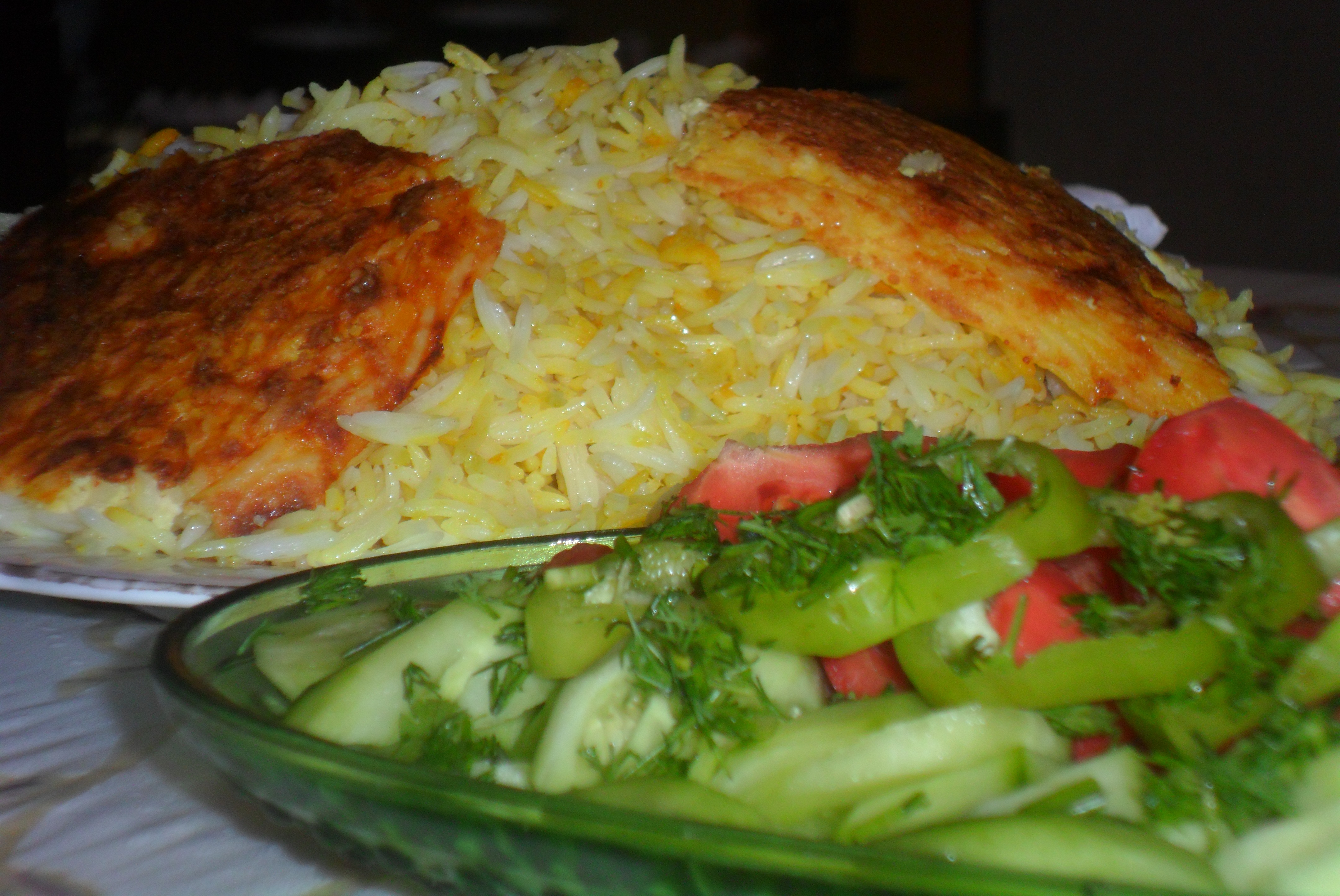 Aş və salat